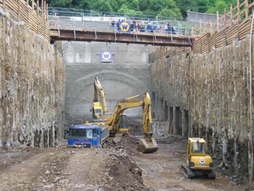 Bauarbeiten im Zuge des Schlossbergtunnel